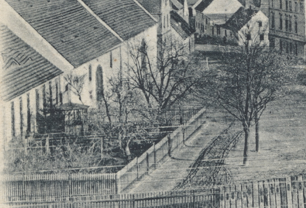 Kantoratsgebäude in Westerhüsen, mit 1863 gepflanzten Bäumen, Aufnahme vermutlich schon in den 1890ern